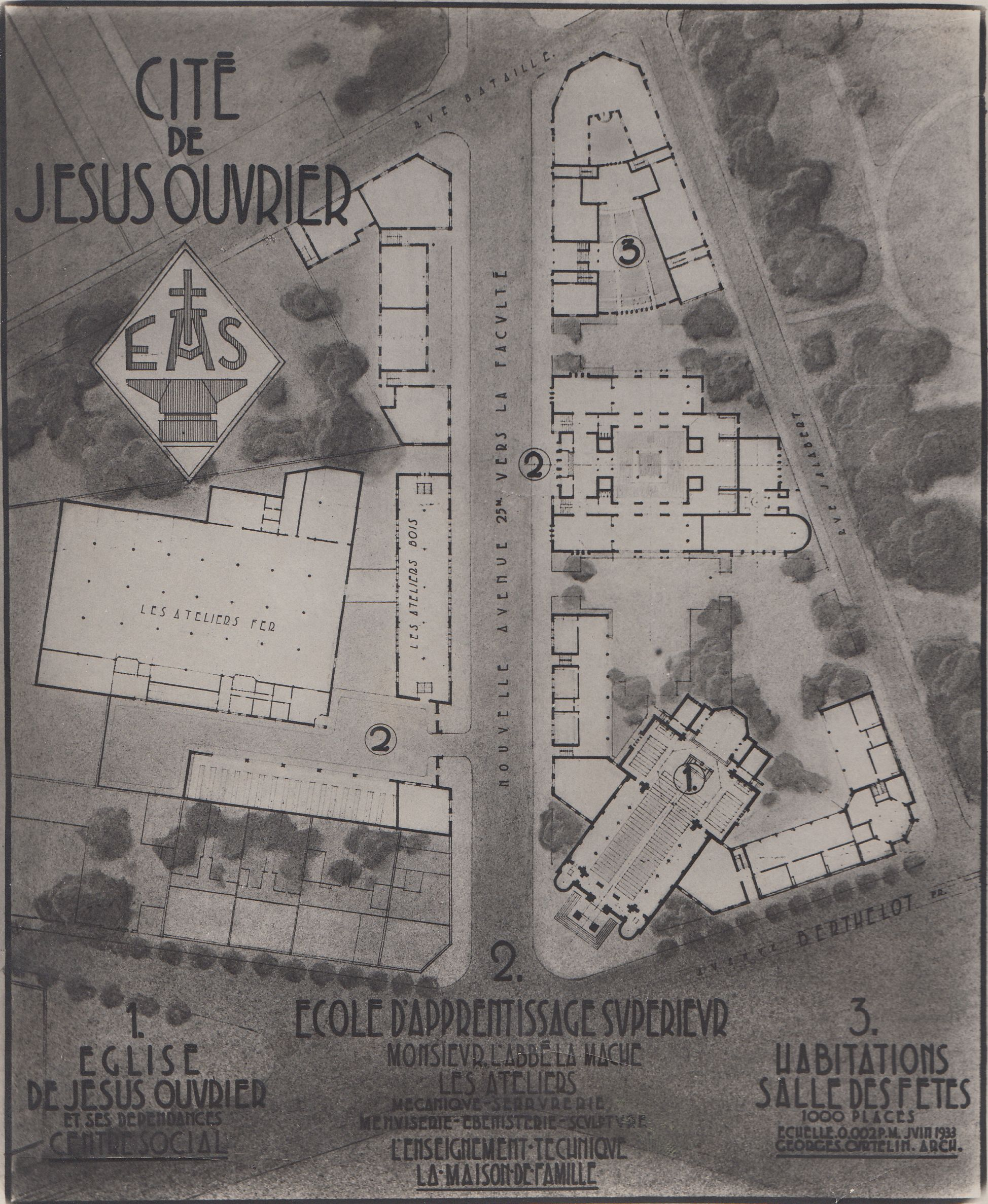 Cité de Jesus ouvrier